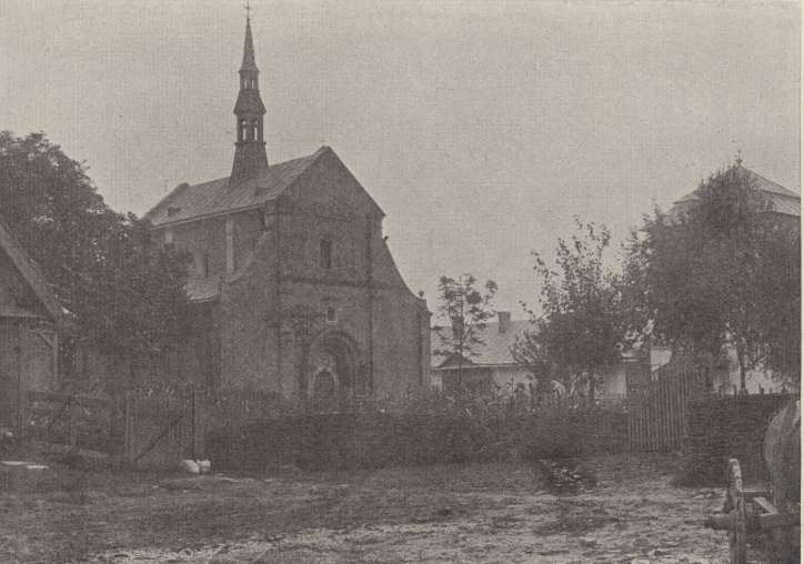 Kościół św. Stanisława w Haliczu, obecnie przebudowany na cerkiew św. Panteleona. Fotografia z początku 20 wieku.